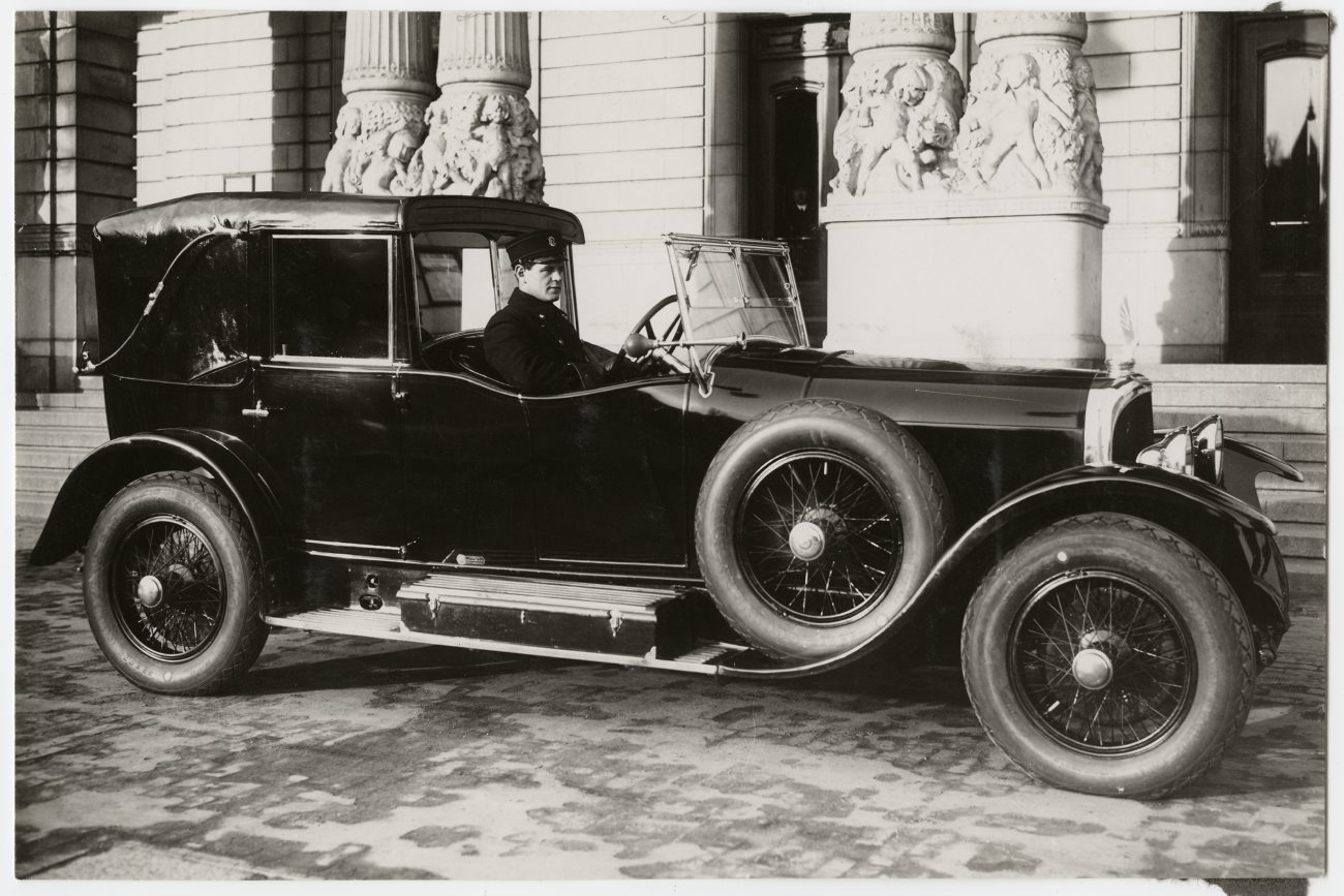 Voisin C3 Cabriolette